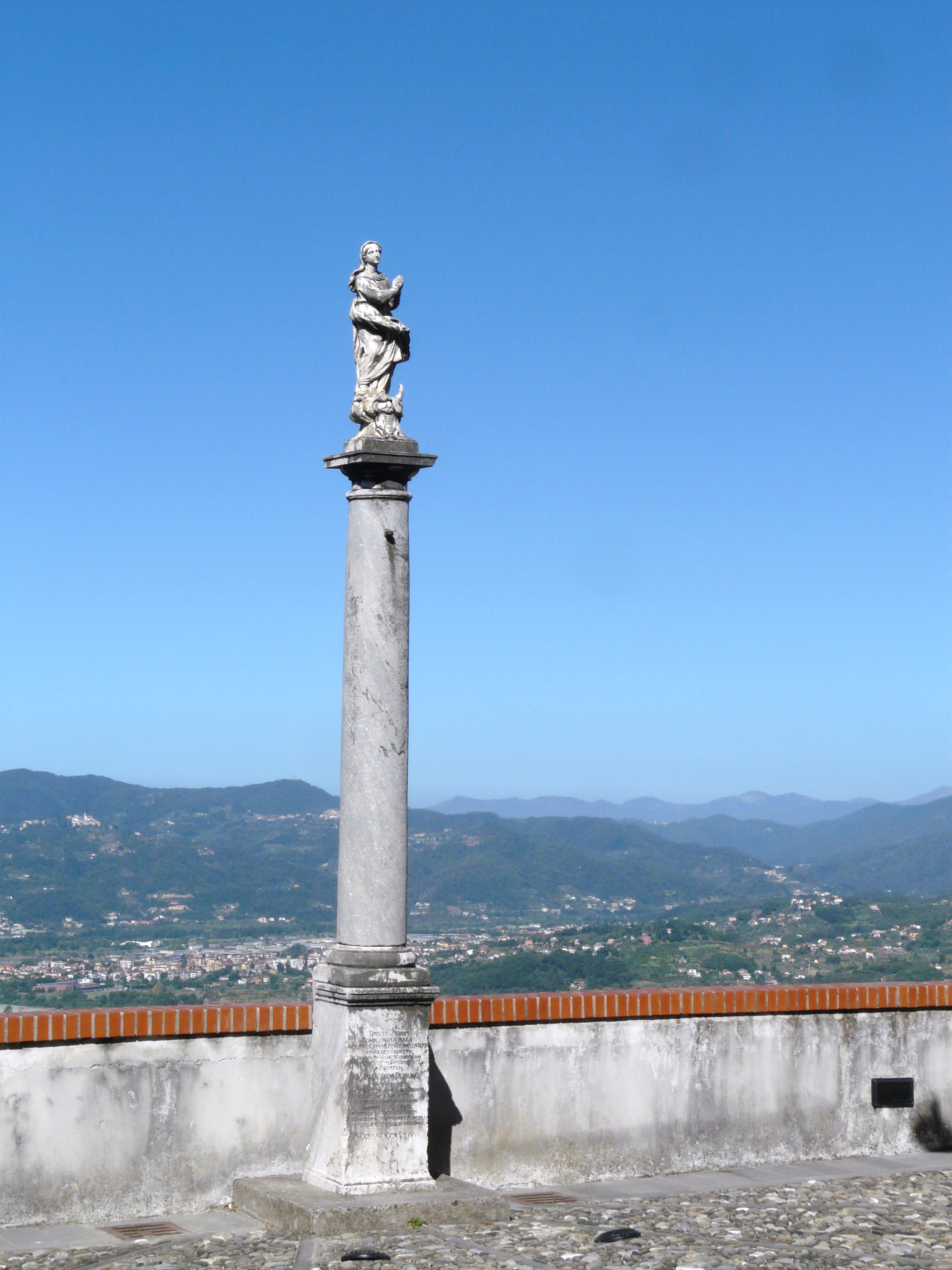 Colonna dell'Immacolata, Ponzano Superiore, Santo Stefano di Magra, Liguria, Italia